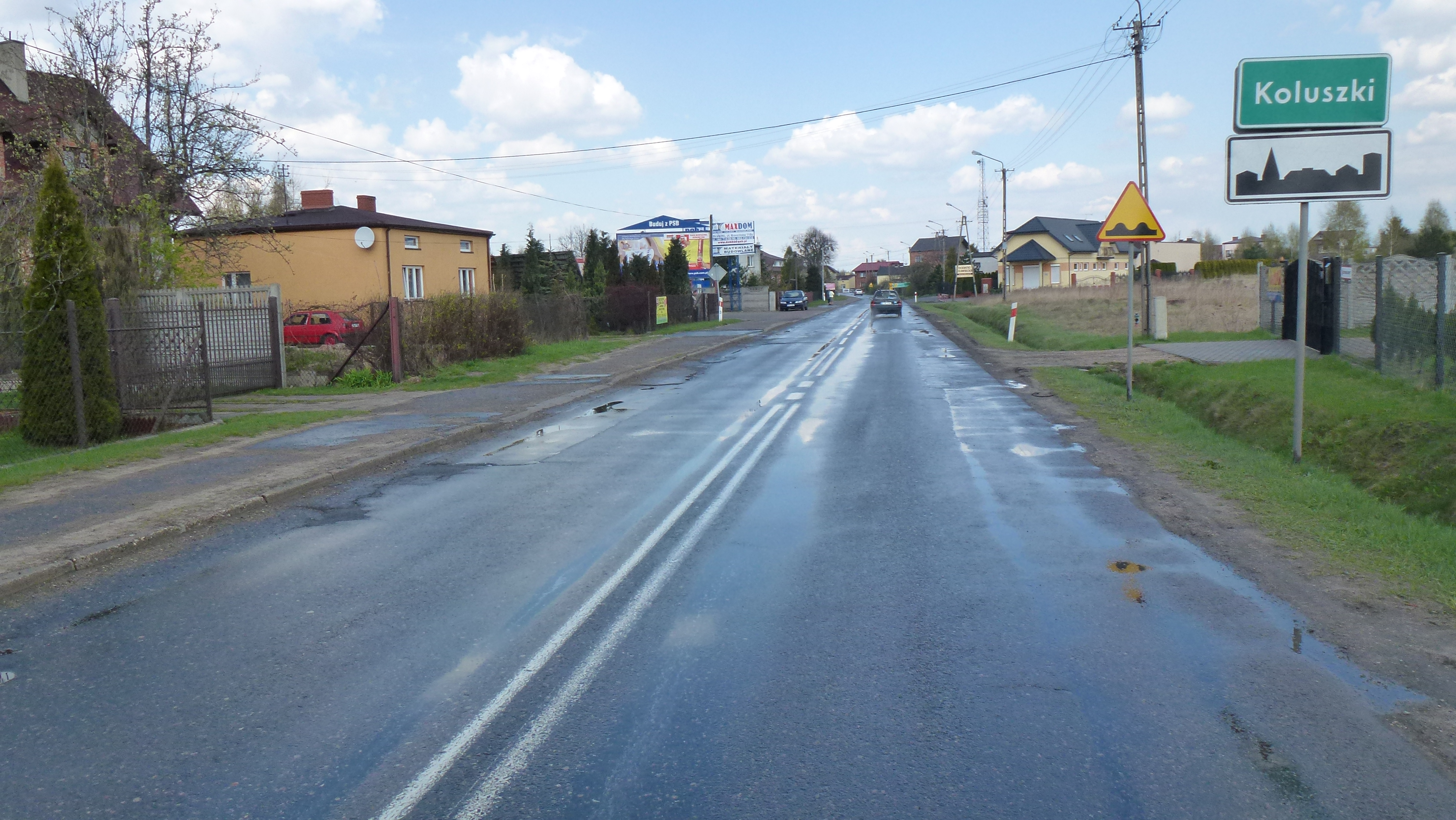 Wjazd do miasta Koluszki DW 716